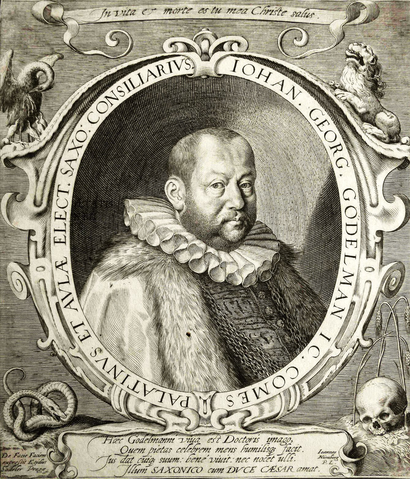 Portret Johanna Georga Godelmana - miedzioryt